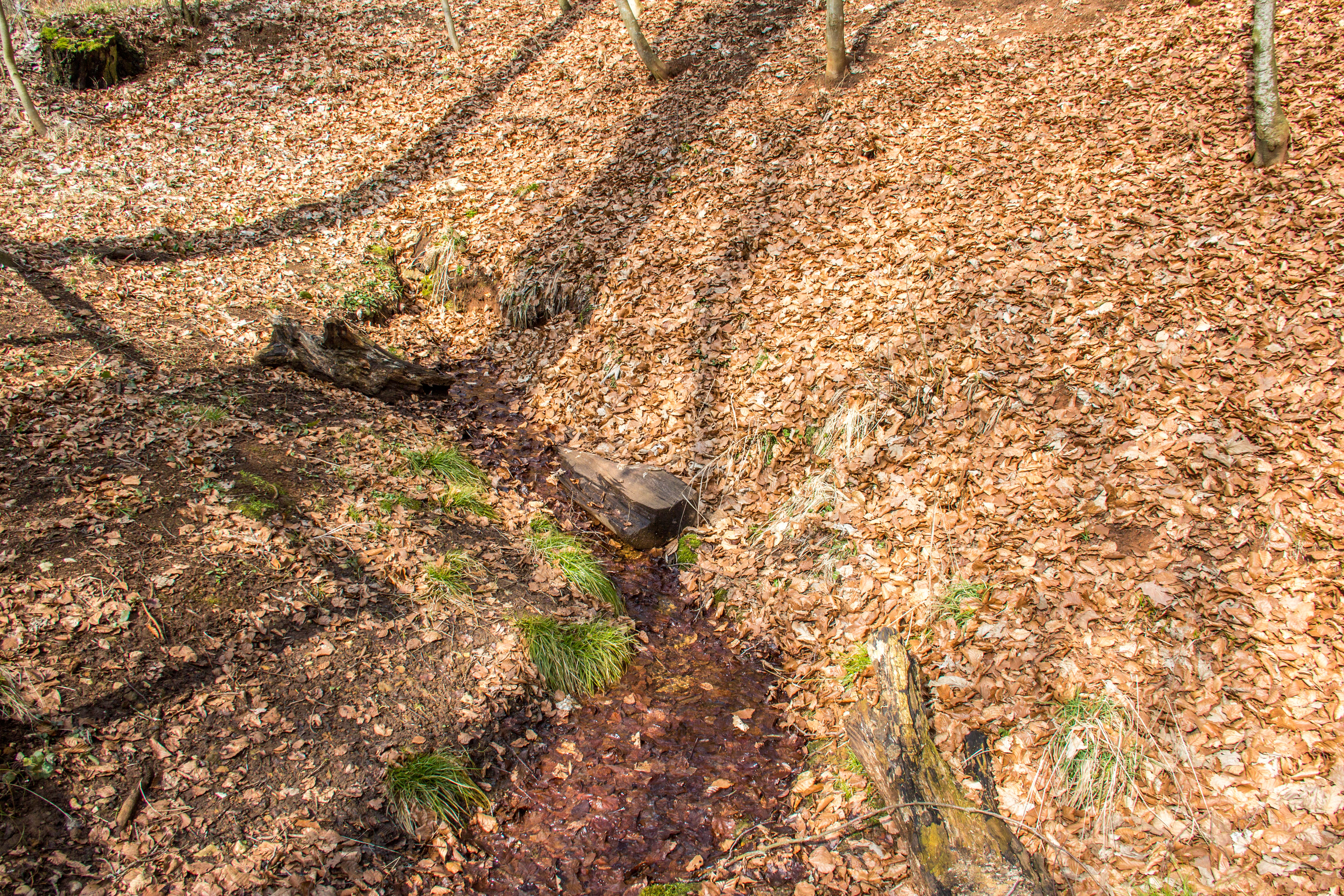 Sieben Quellen, Karstquelle, Geotop, Heidenheim